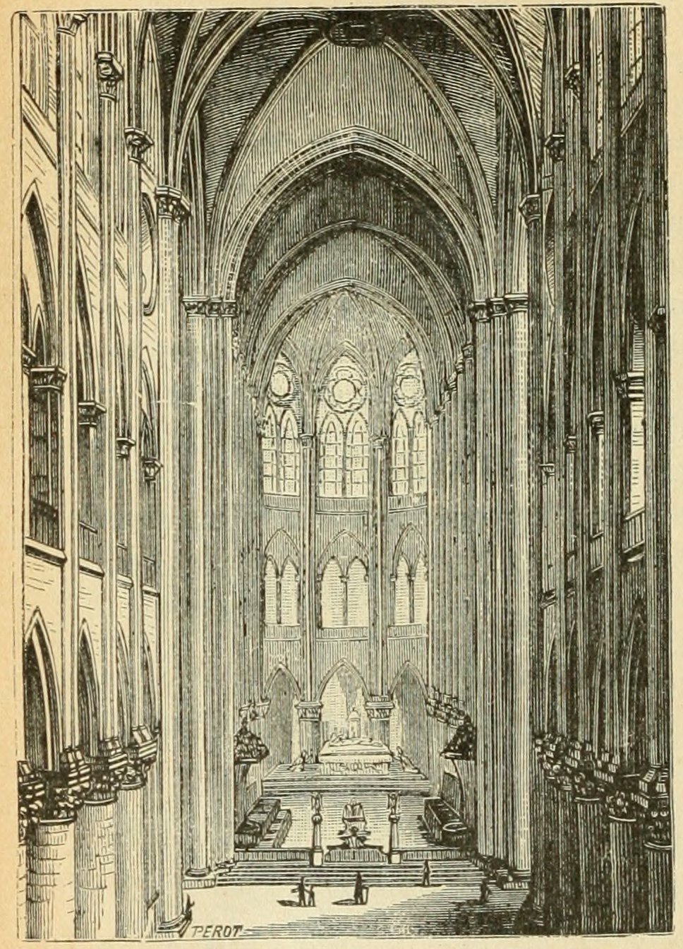 Le tour de la France par deux enfants, par George Bruno, manuel scolaire, édition de 1904.